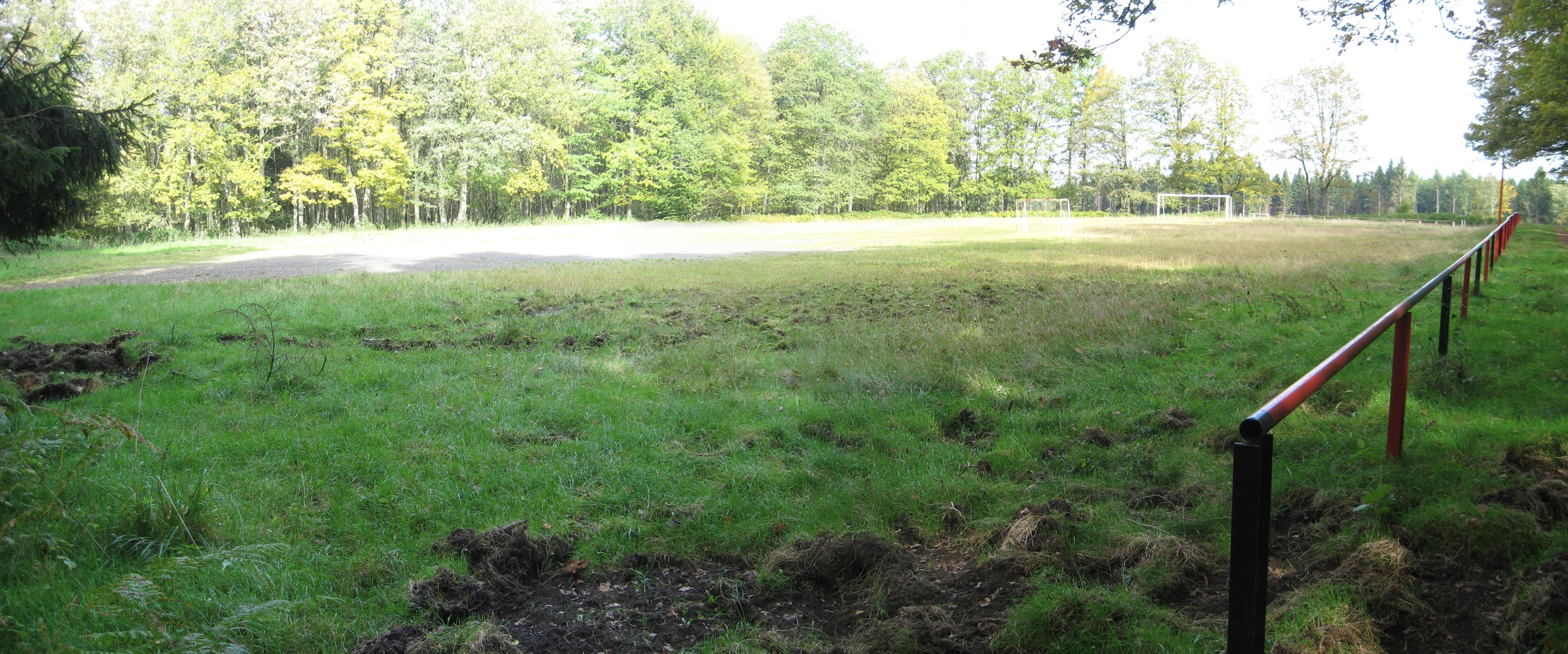 Der Sportplatz an der Kalteiche oberhalb Wilnsdorfs im Siegerland.